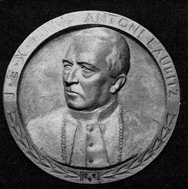 Plakieta przedstawiająca bp. Antoniego Laubitza, ustanowiona w siedzibie Rady Miejskiej w Gnieźnie (1939)